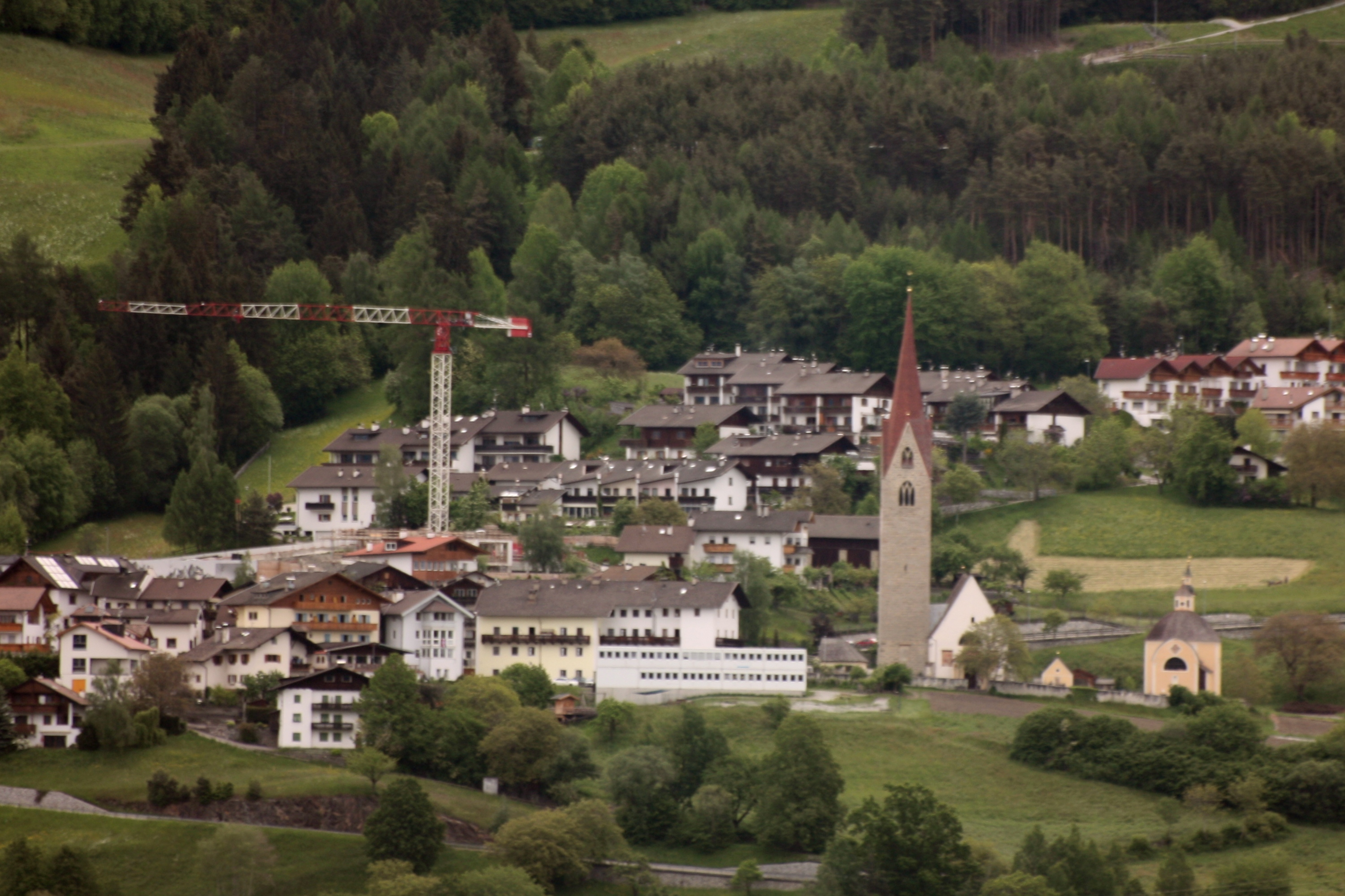 Brixen, Südtirol: Blick auf die Fraktion St. Andrä